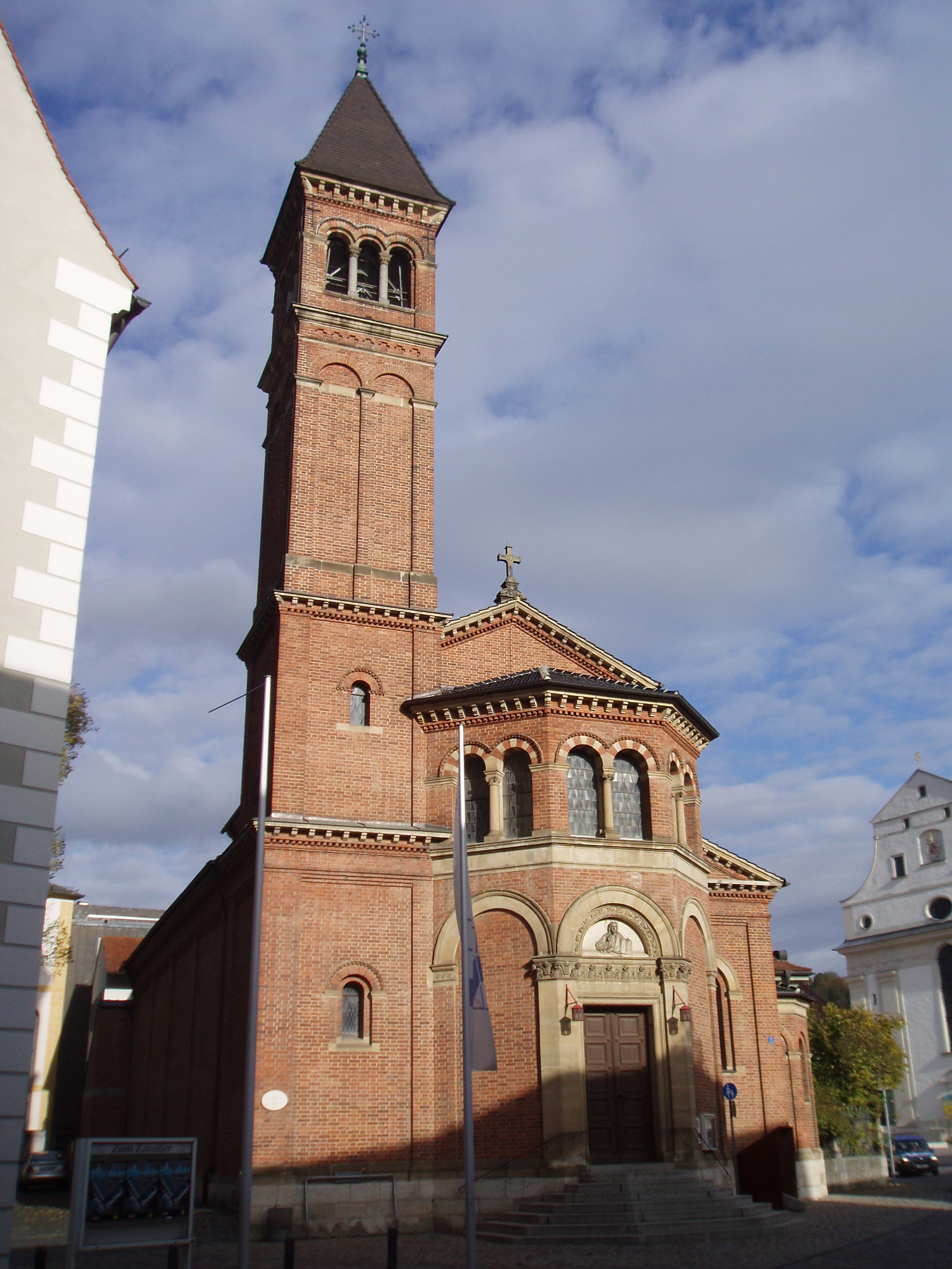 Evangelische Erlöserkirche in Eichstätt im oberbayerischen Landkreis Eichstätt